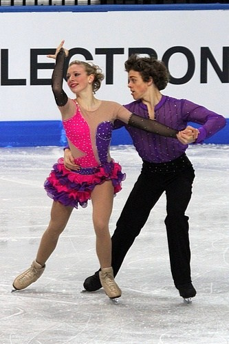 Рахель Парсанс и Михаель Парсонс (США) на чемпионате мира по фигурному катанию среди юниоров 2012